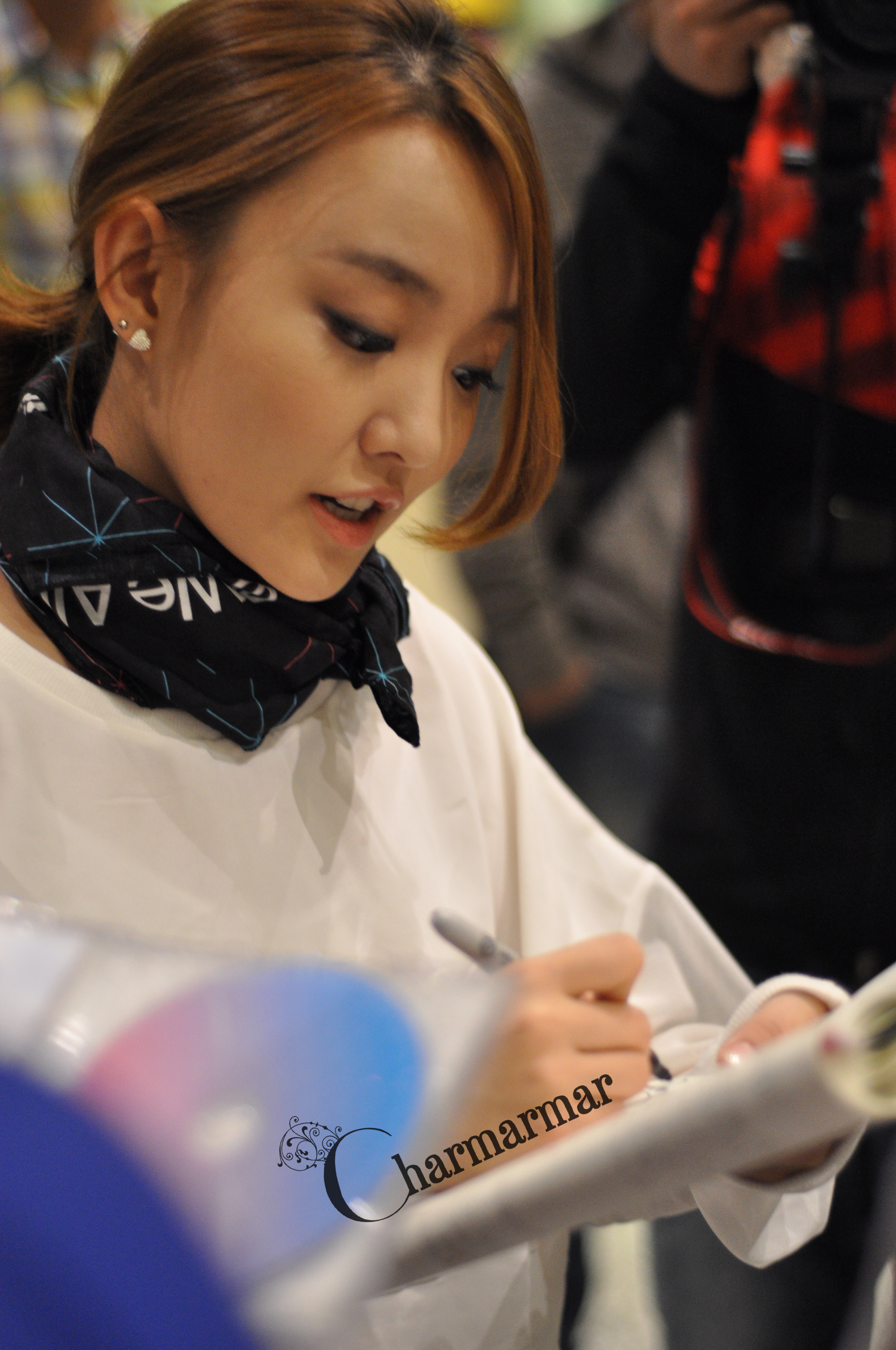 2012년 8월 16일 윤하.